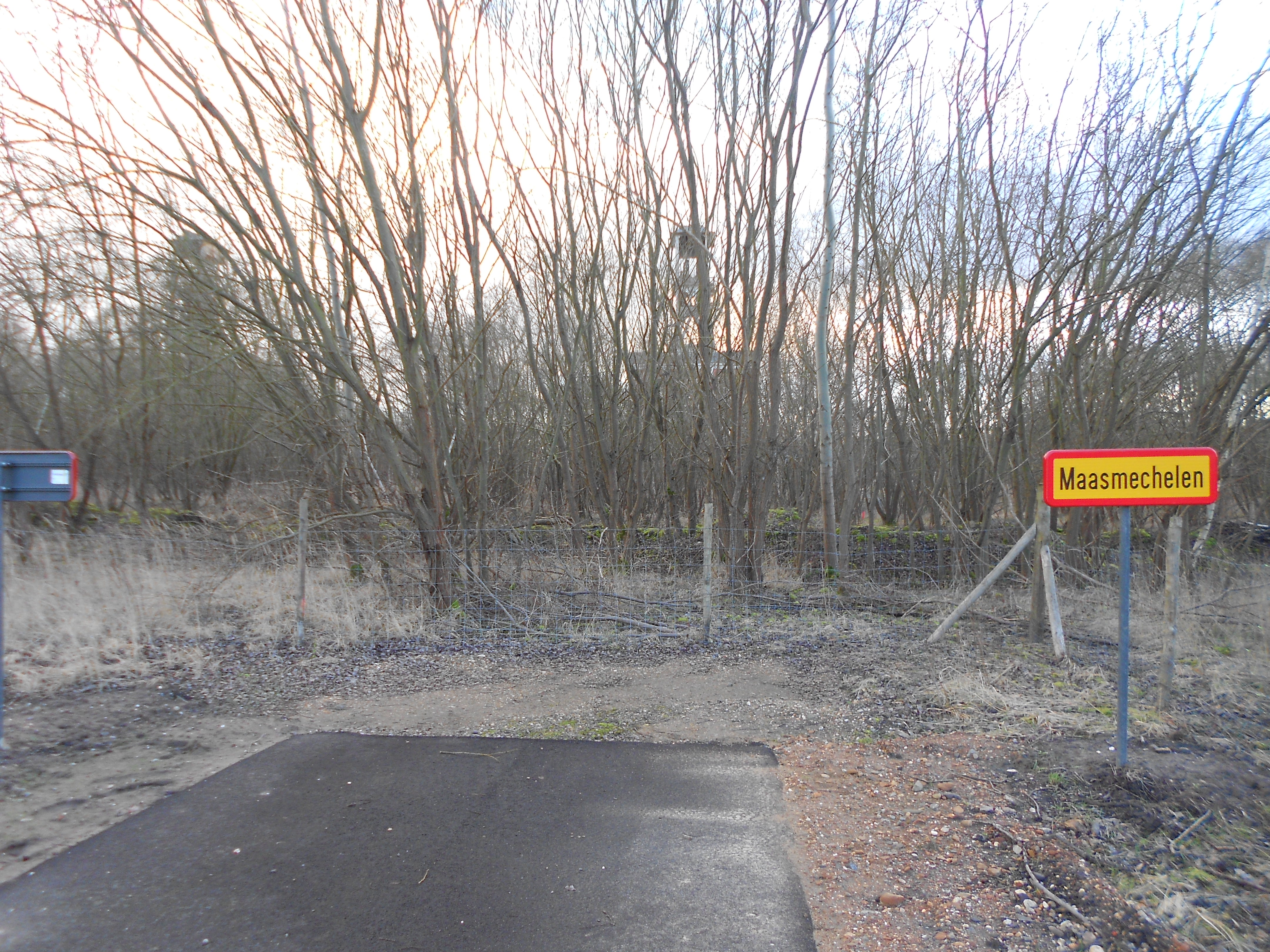 Doodlopende weg aan de grens met Maasmechelen bij de Terhills, bij de toegangspoort Connecterra van het Nationaal Park Hoge Kempen. Op de achtergrond, de schachtbokken van de steenkoolmijn van Eisden.